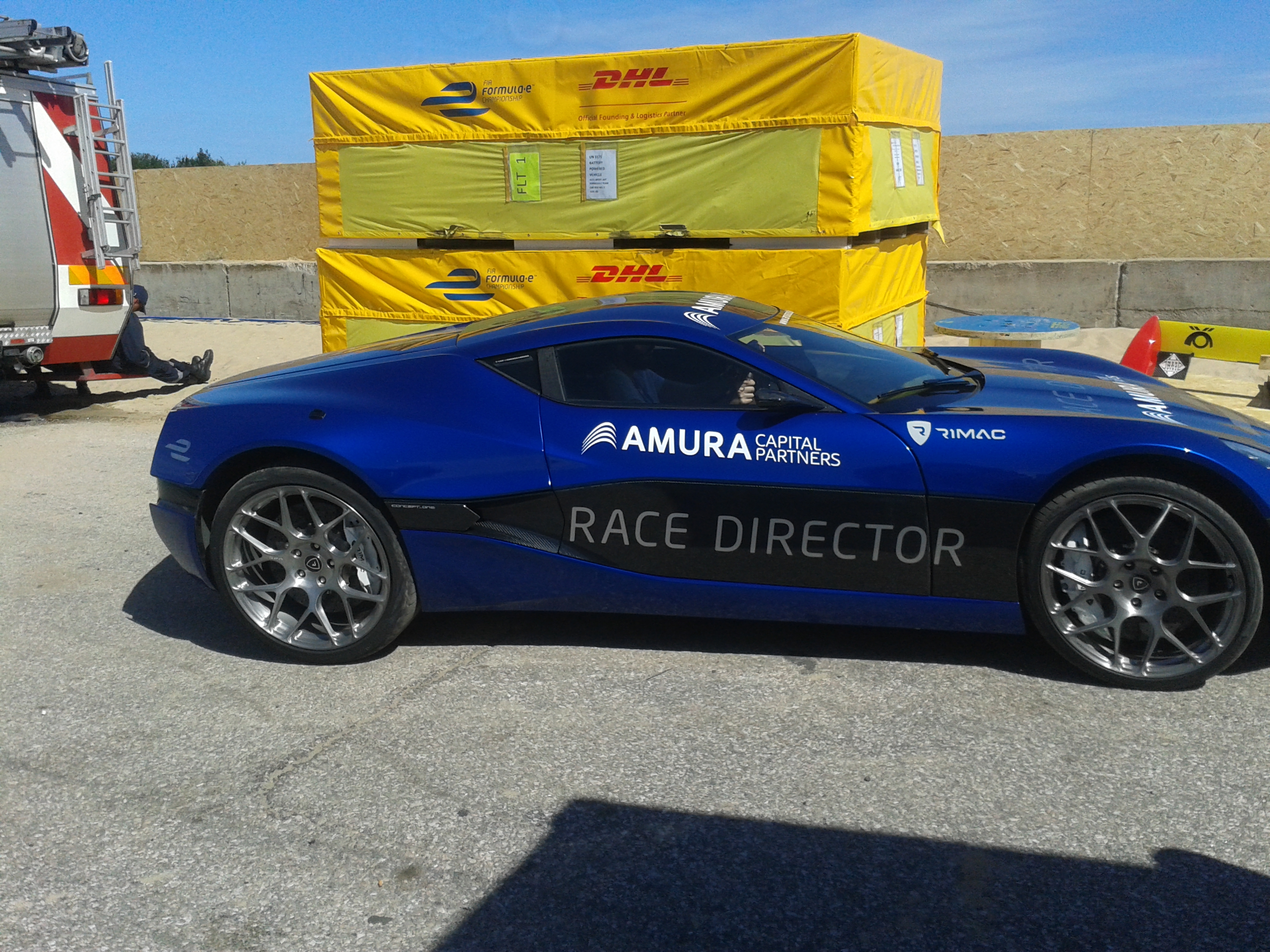 aaaaa